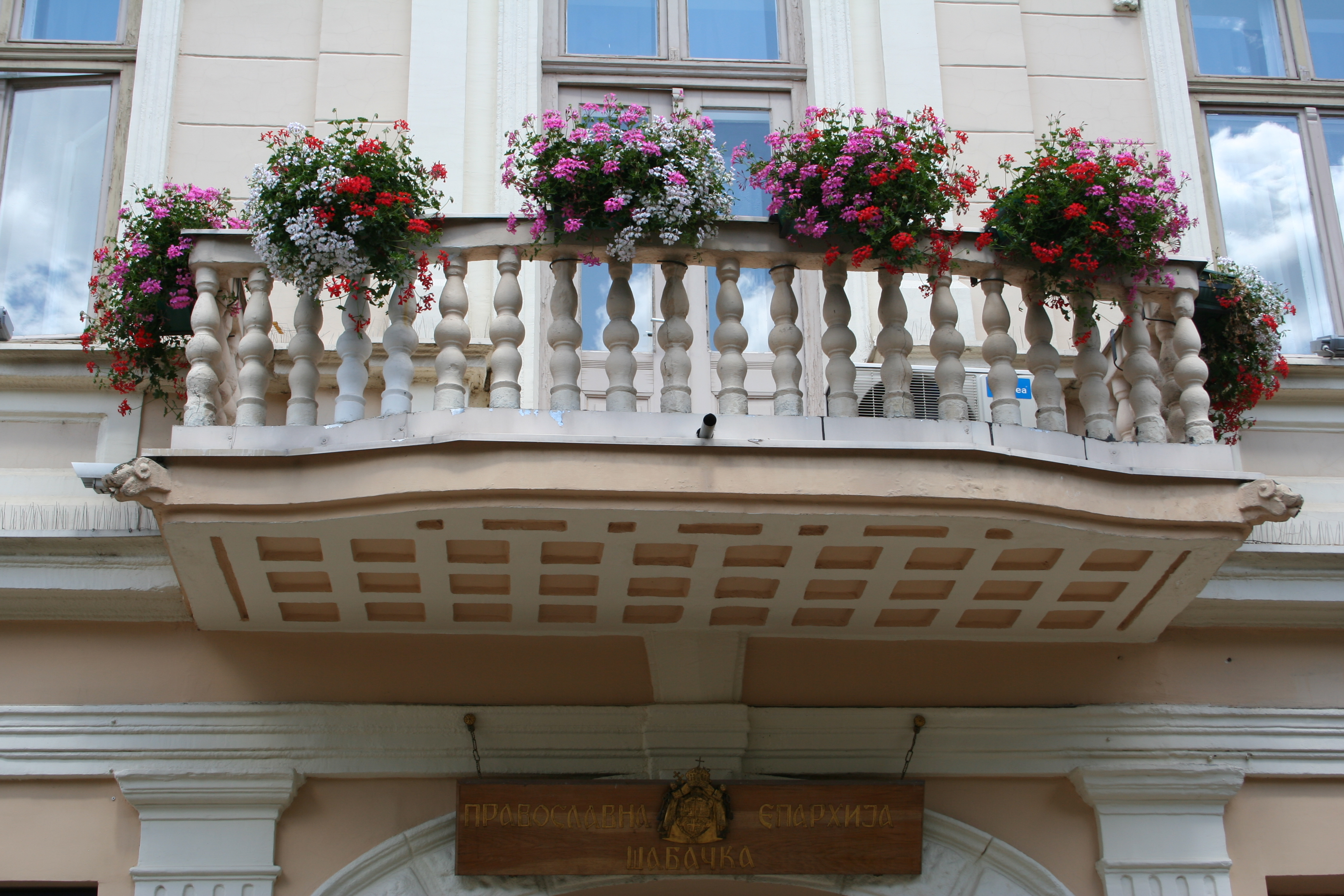 Arambašića kuća, detalj